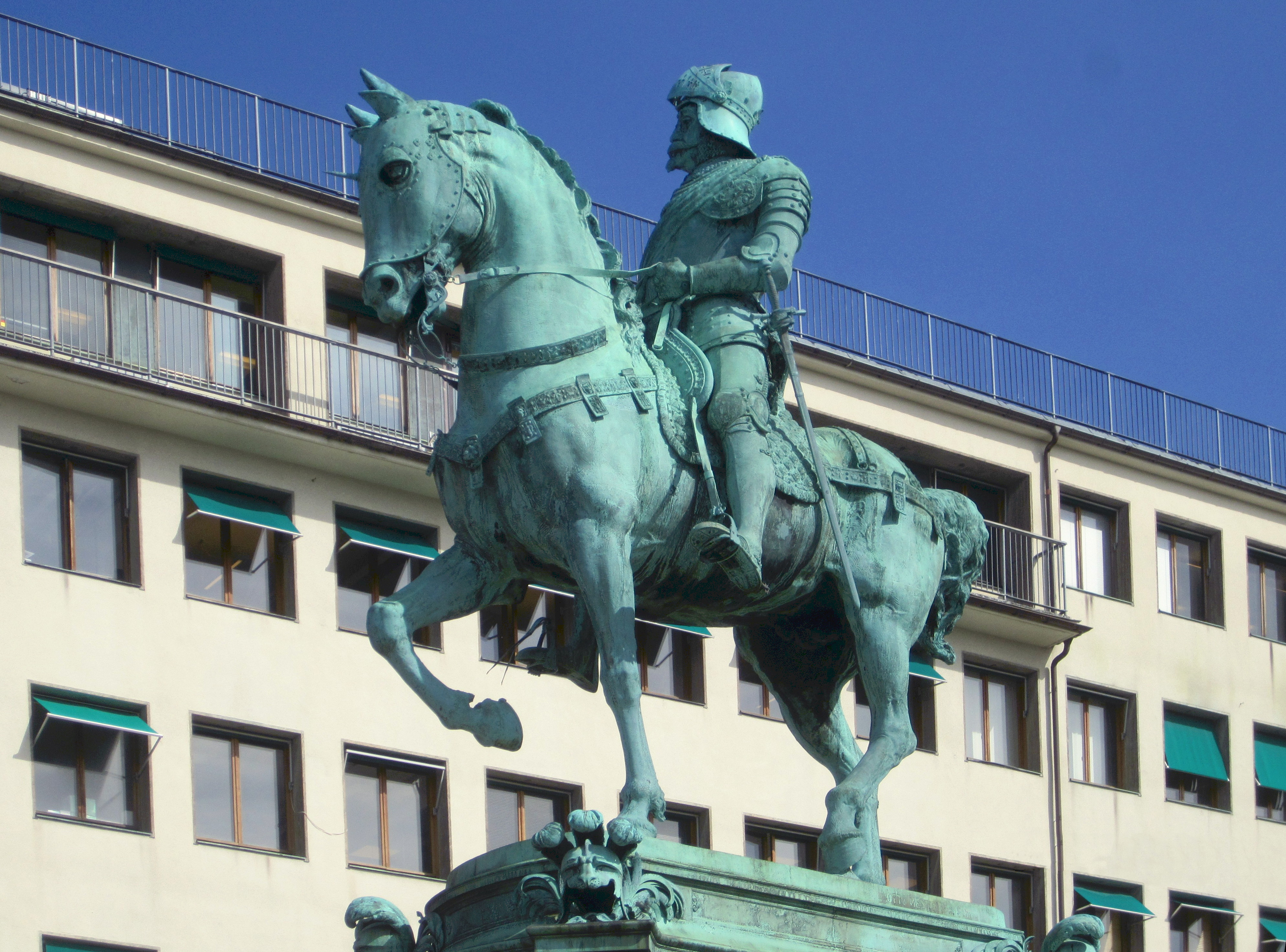 Estátua equestre de CarlosIX da Suécia